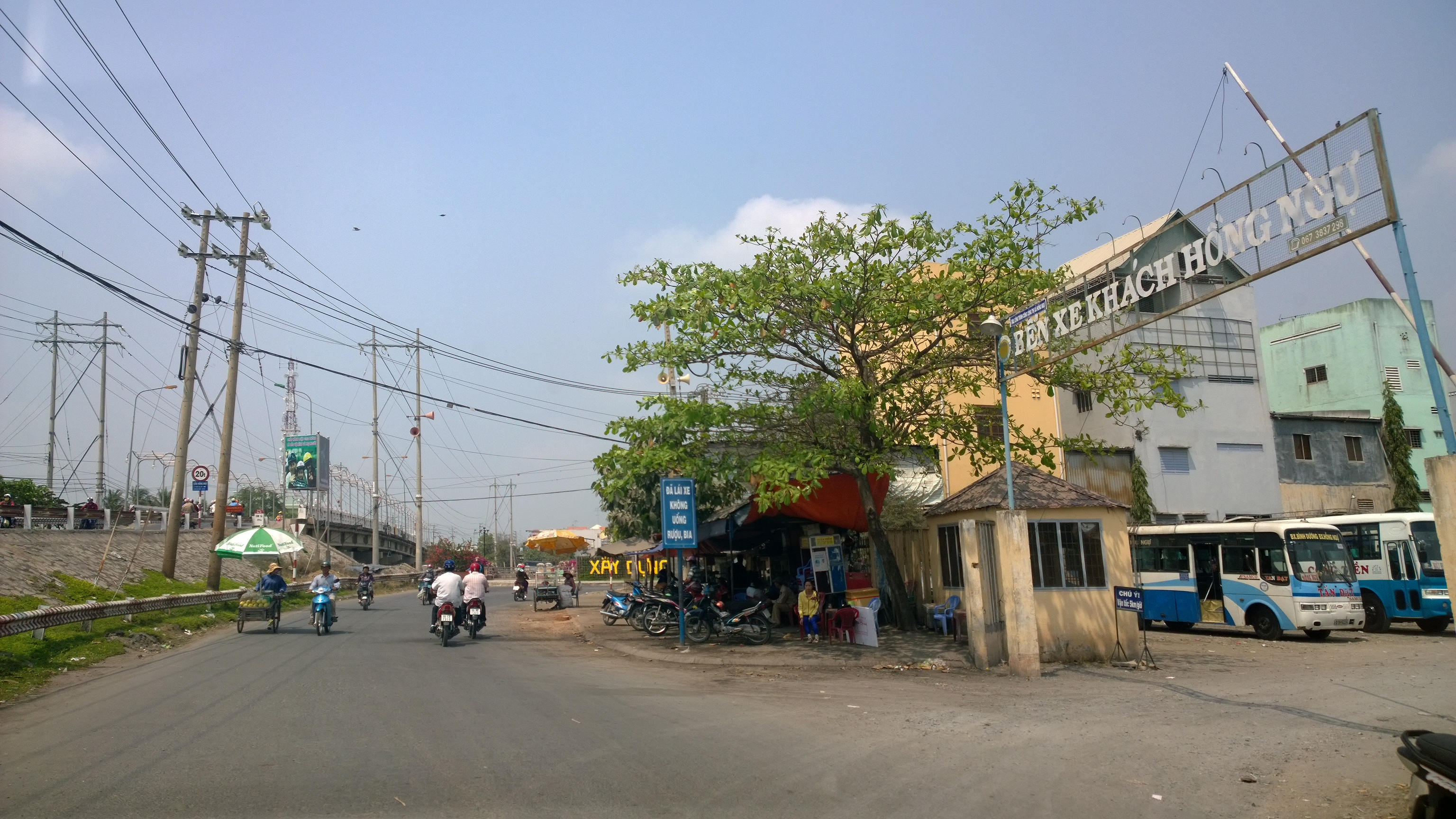 Ben xe Hong Ngu, Tl 842, an binh A, tx hong ngu, Dong Thap, Vietnam